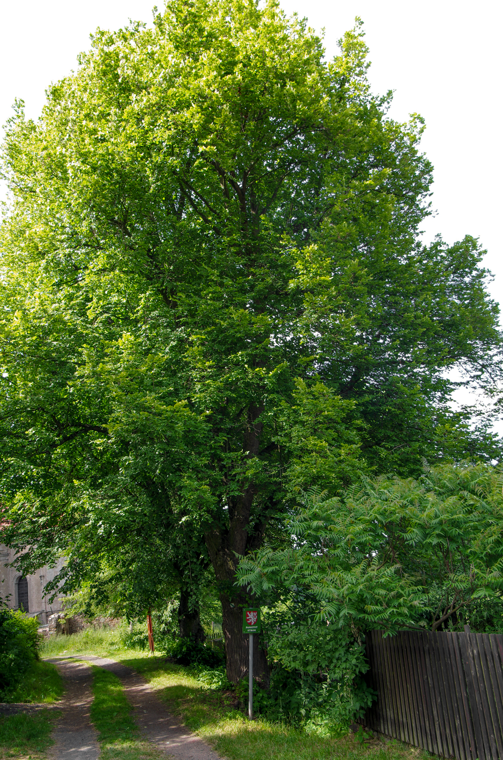 památné stromy Lípy u fary v Bečově, Bečov nad Teplou, Slavkovský les, okres Karlovy Vary